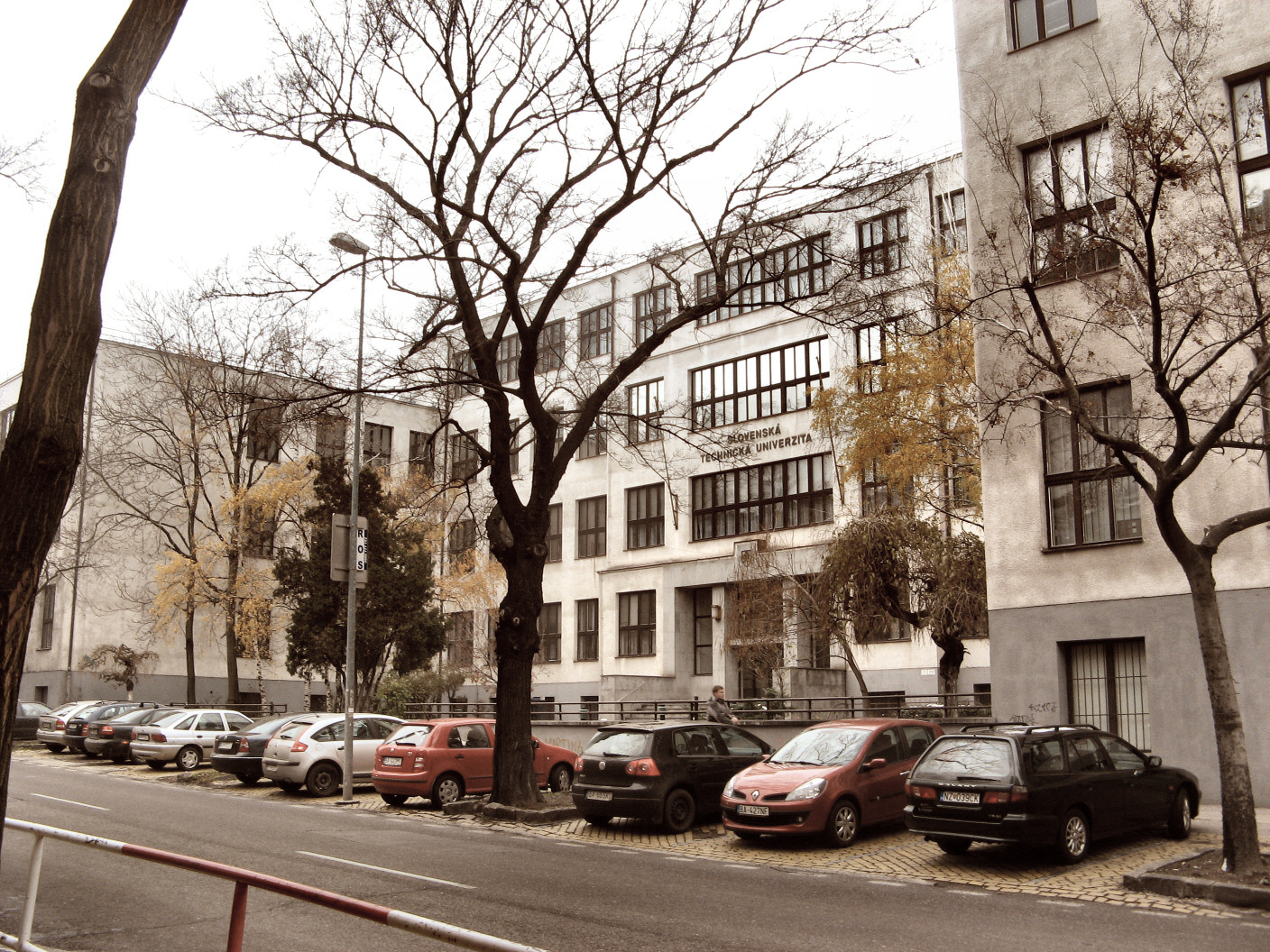 Jiří Grossmann: Škola umeleckých remesiel (dnes Slovenská technická univerzita), Bratislava, 1928